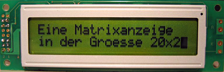 Eine Matrixanzeige in der Größe 2×20 Zeichen.